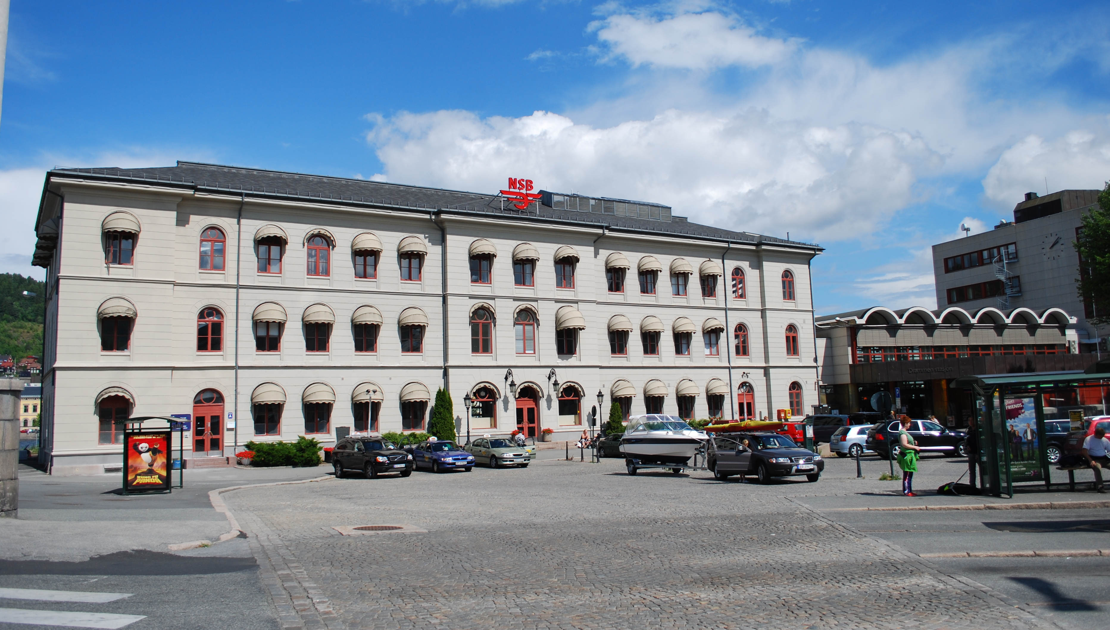 Drammen stasjon, sett fra Strømsø torg. Bygningen er fra 1863 og er tegnet av Georg Andreas Bull.